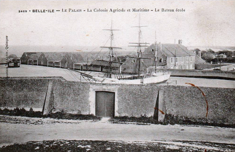 Carte postale de la colonie pénitentiaire Haute-Boulogne de Belle-Ile